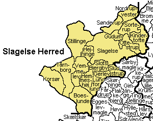 Slagelse Herred Sorø Amt , Denmark. Map by Svend-Erik Christiansen, edited by user:Nico-dk .